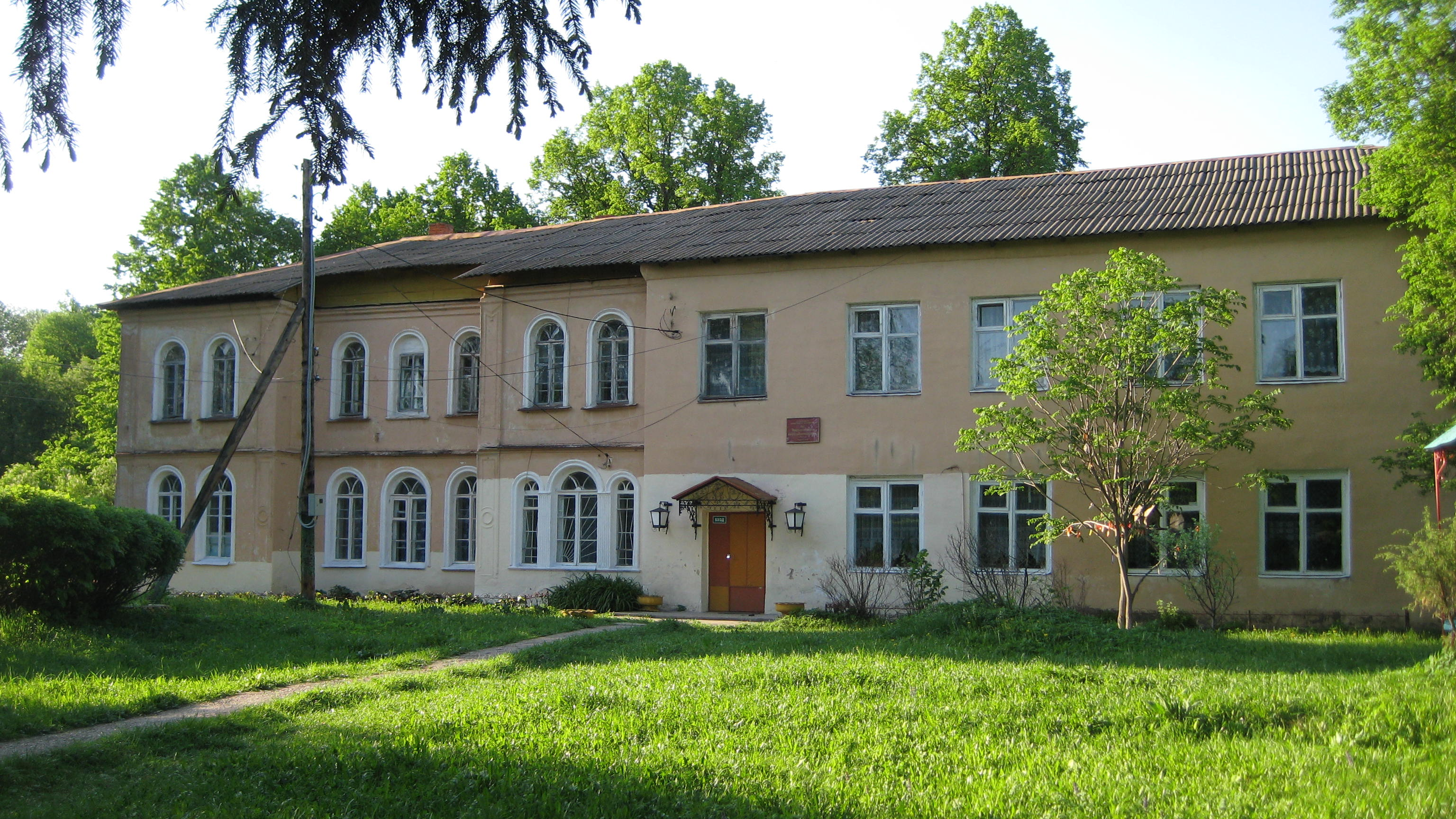 Дворянская усадьба Истомино